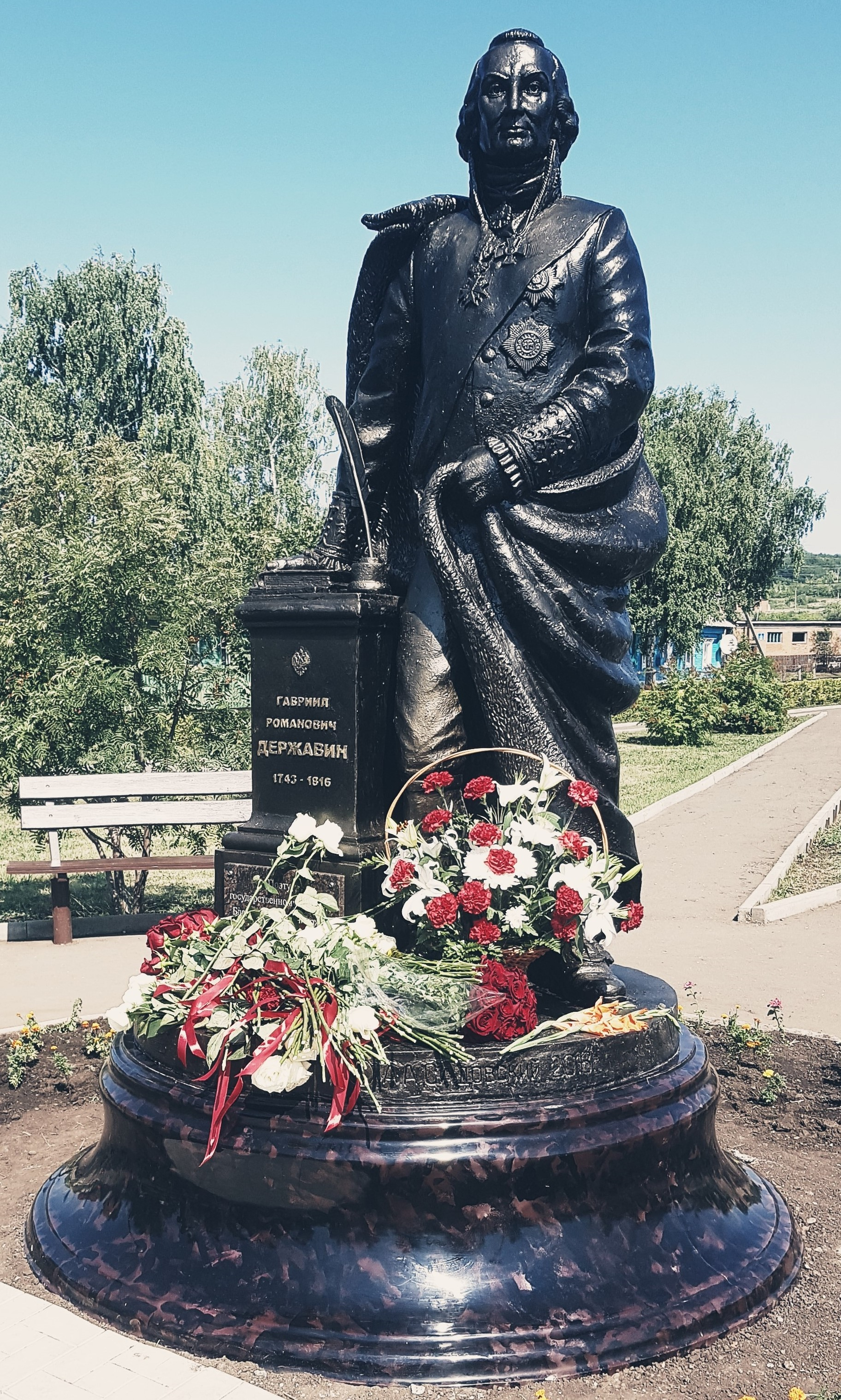 Памятник Г.Р. Державину установленный в год 275-летия поэта.